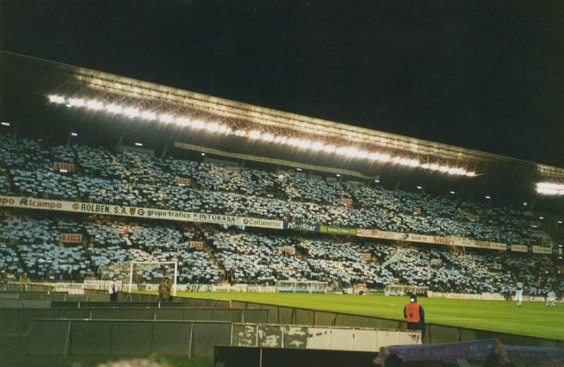 Estadio de Balaídos Real Club Celta de Vigo